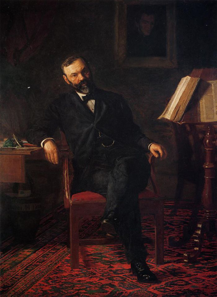 Dr John H Brinton